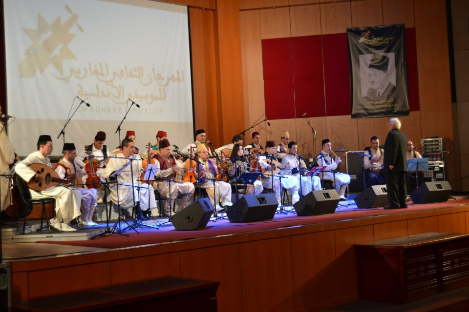 l'ensemble pilote de Koléa lors d'une soirée de musique andalouse